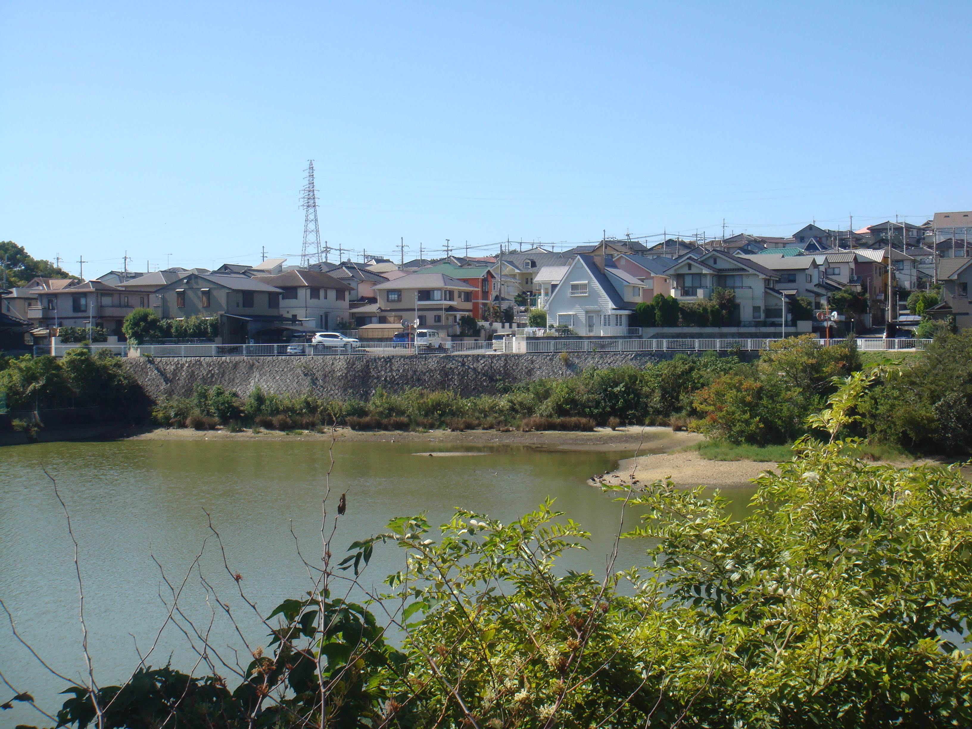 緑が丘全景